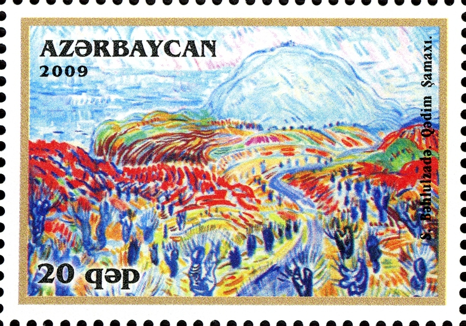 Azerbaijan Art School - Sattar Bakhlulzadeh - Ancient Shamakha